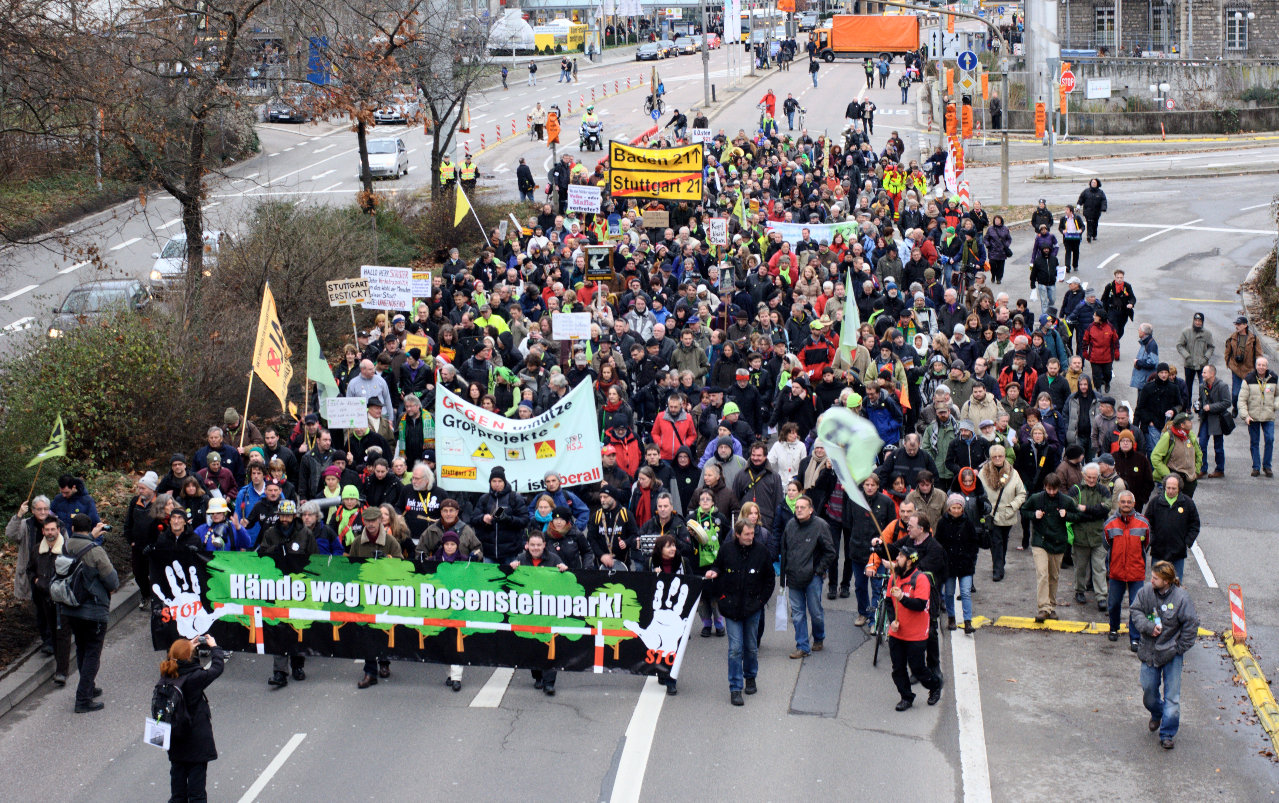 Demonstration gegen Stuttgart 21 am 22. Dezember 2012, vor dem Stuttgarter Hauptbahnhof